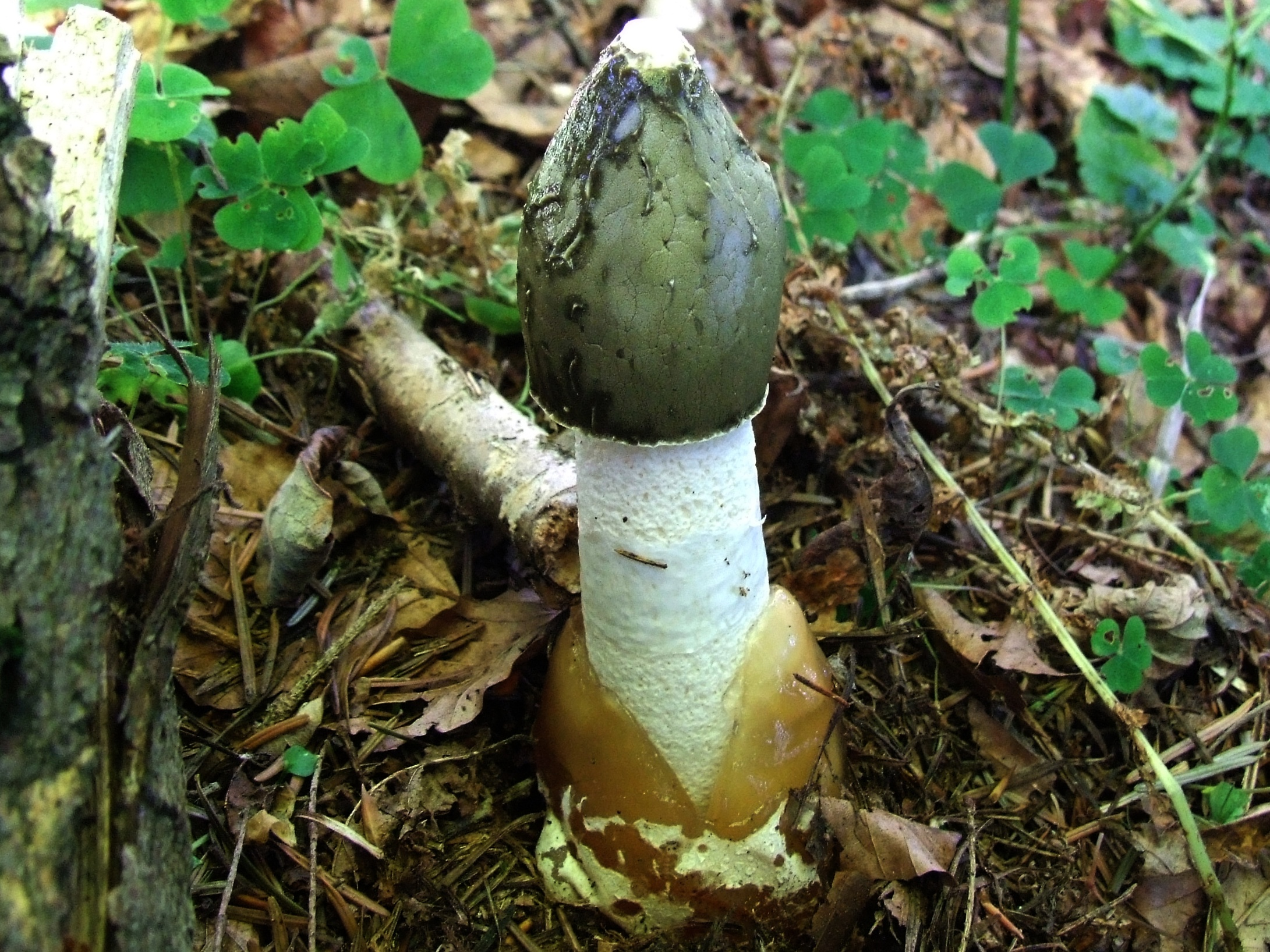 Phallus impudicus (location: Poland, Kamionna, województwo małopolskie)